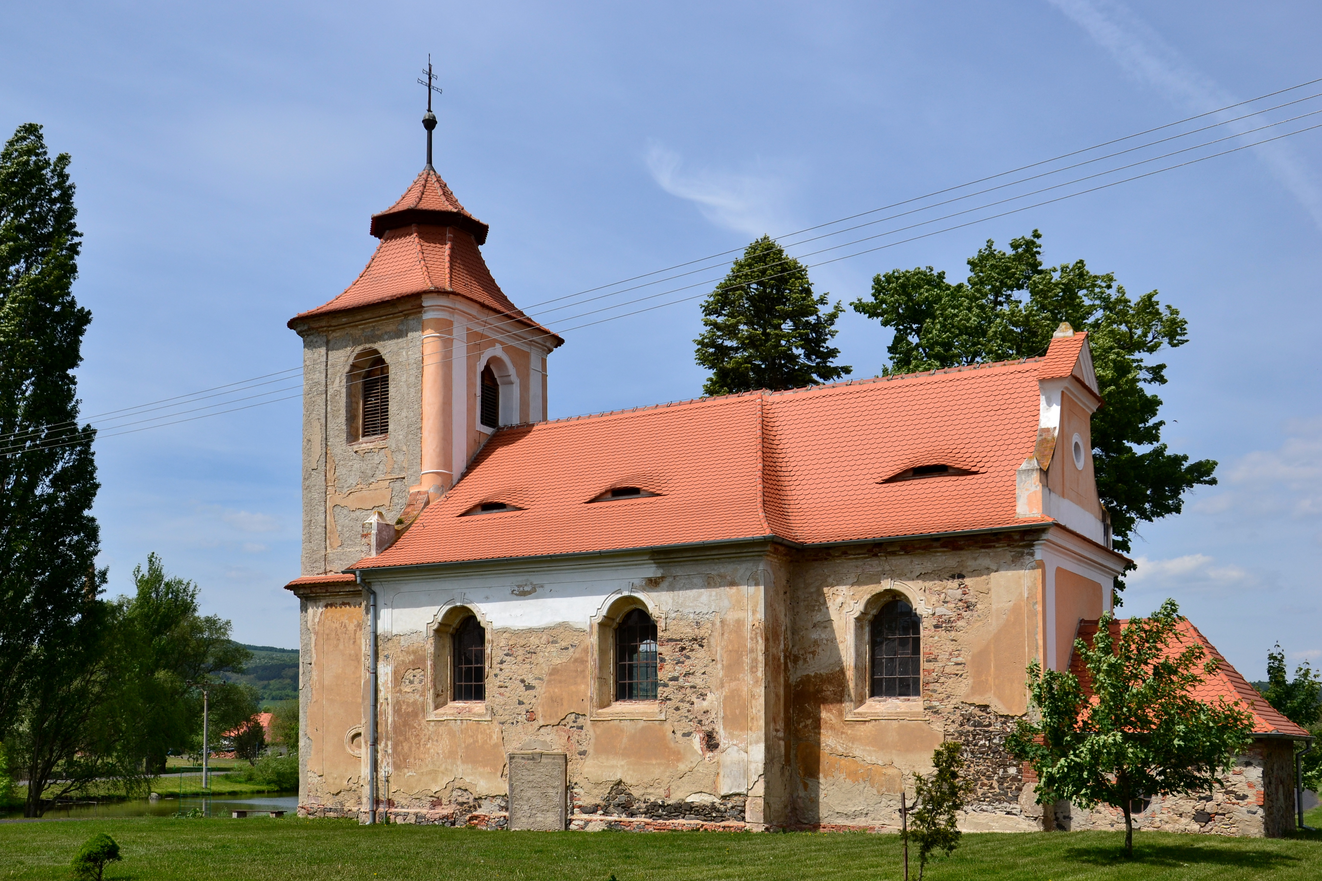 Jižní strana